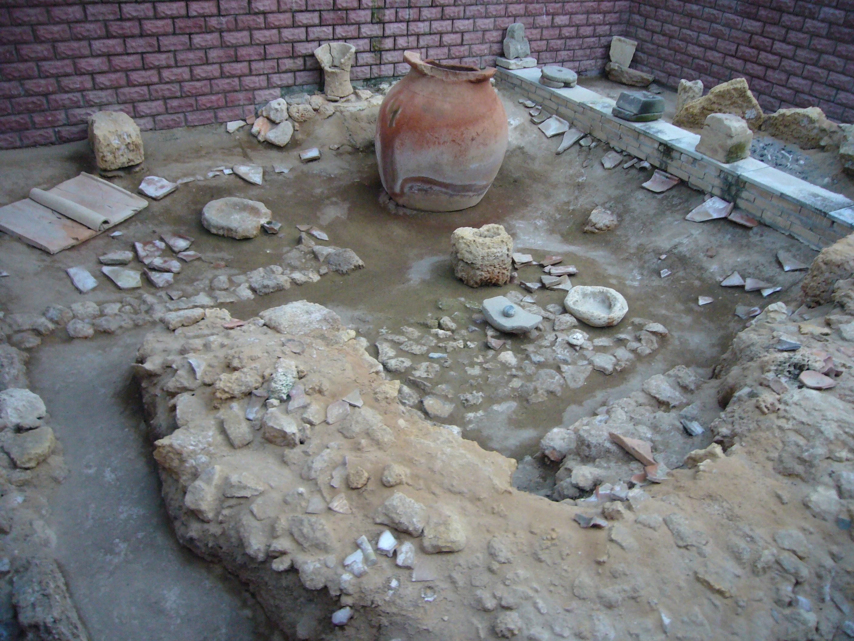 Kerkinitida archeological site of ancient Greek settlement in front of Eupatoria Museum on Duvanovskaya Street in Eupatoria, Crimea, Ukraine./ Фрагмент экспозиции археологического комплекса городища древнегреческого поселения Керкинитиды перед Краеведческим музеем Евпатории (АР Крым, Украина).